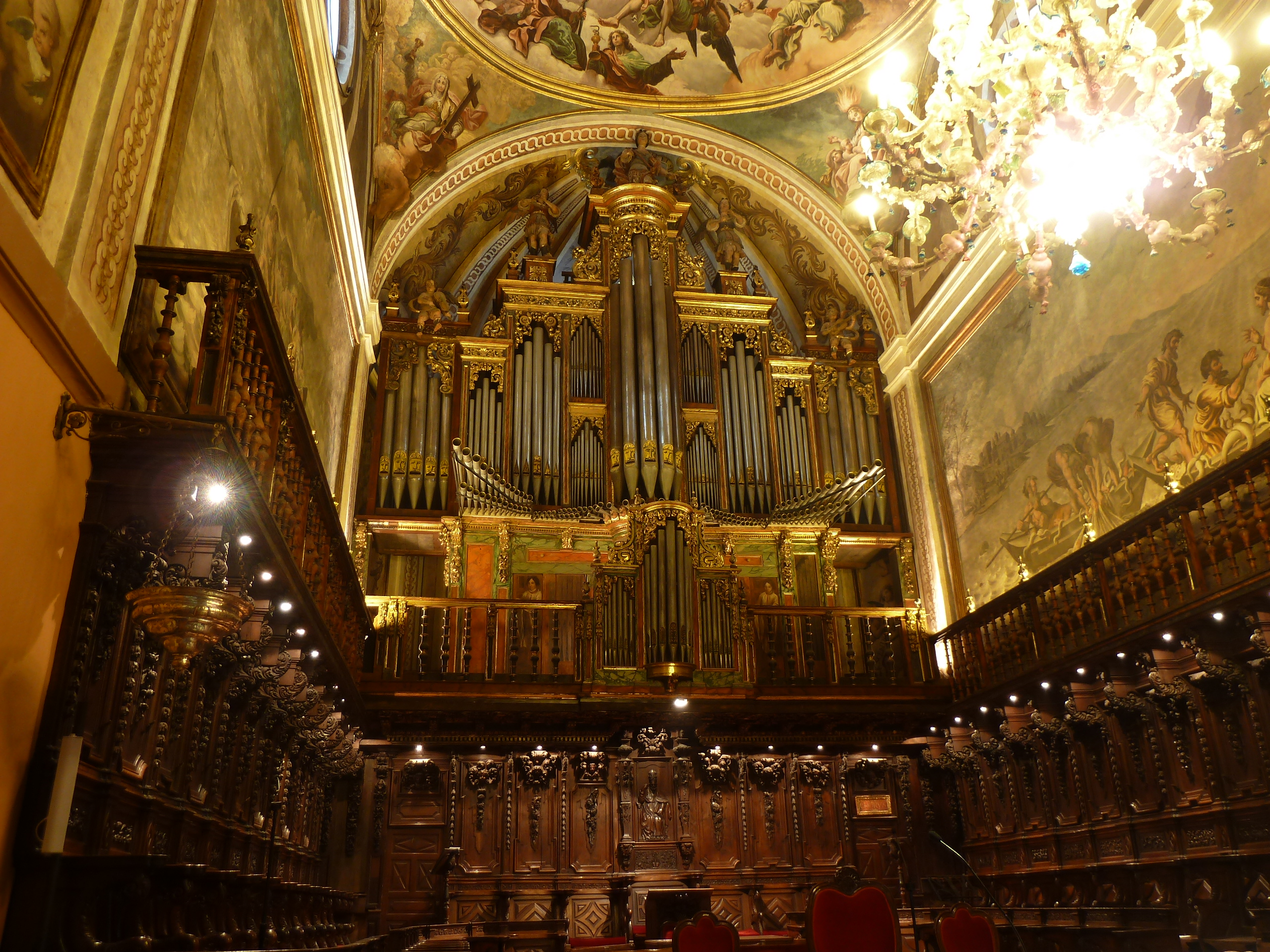 Sillería del coro y órgano situado en el ábside central.